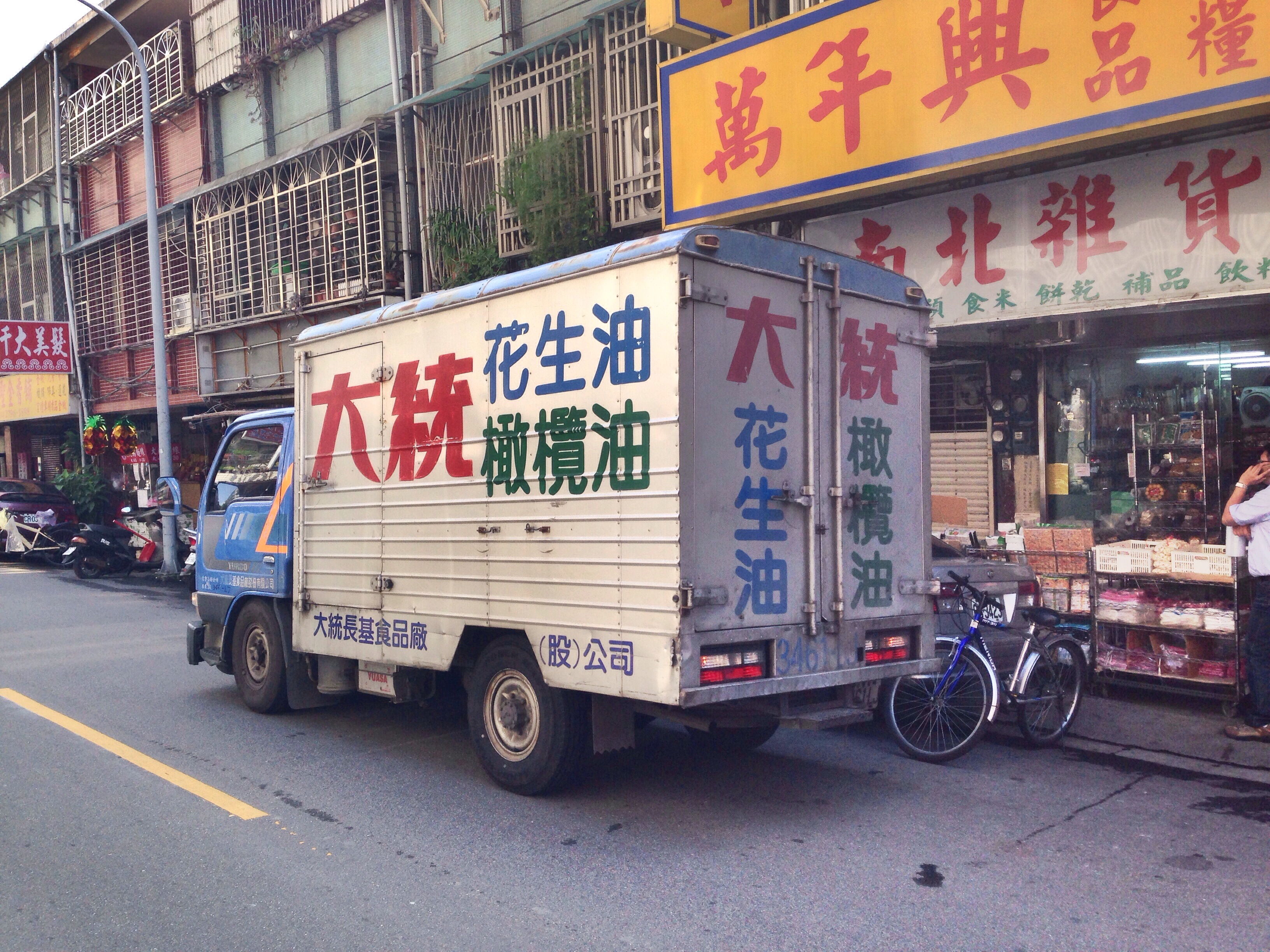 中文（台灣）: 大統長基食品的日產勁旺Turbo 320貨車3461-LJ。